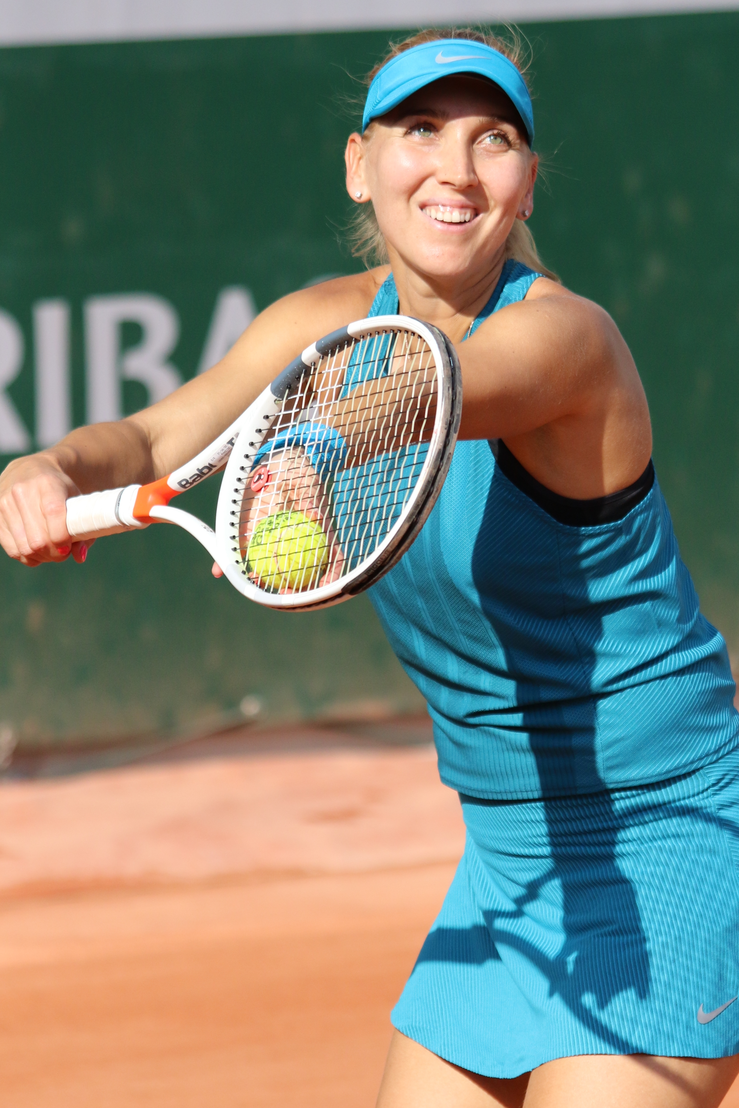 Vesnina RG18 (8)